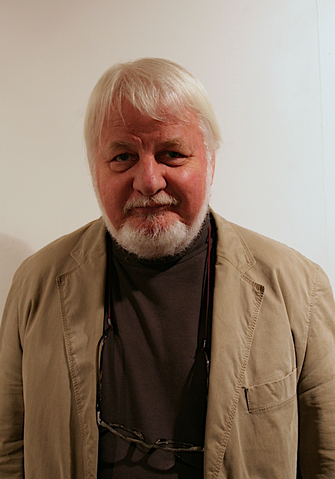 Gunnar Danbolt